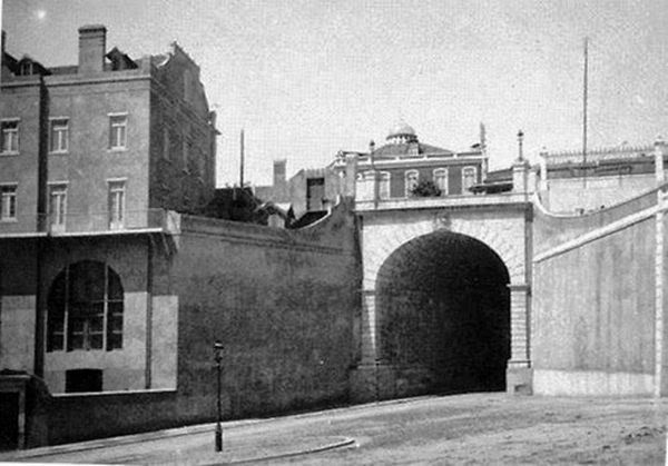 Funiculares de Lisboa.